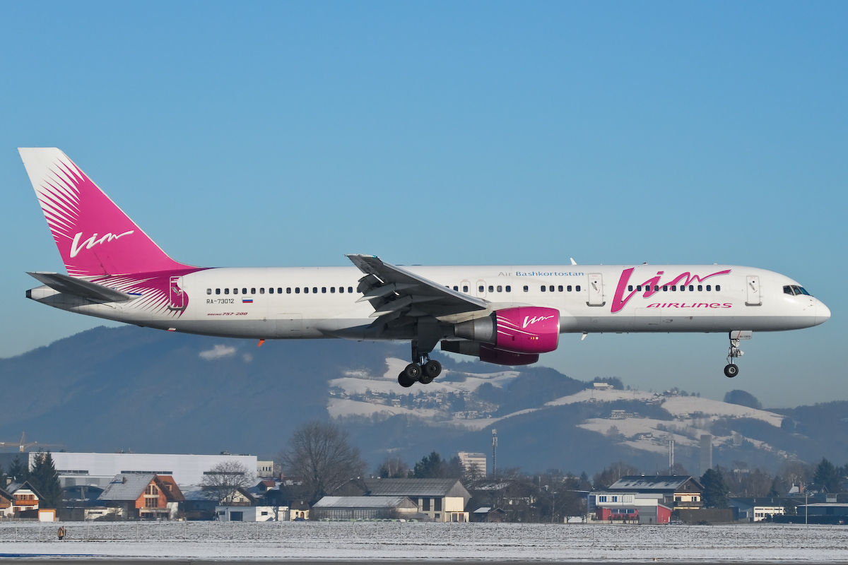 Vim Airlines Boeing 757 landet in Salzburg